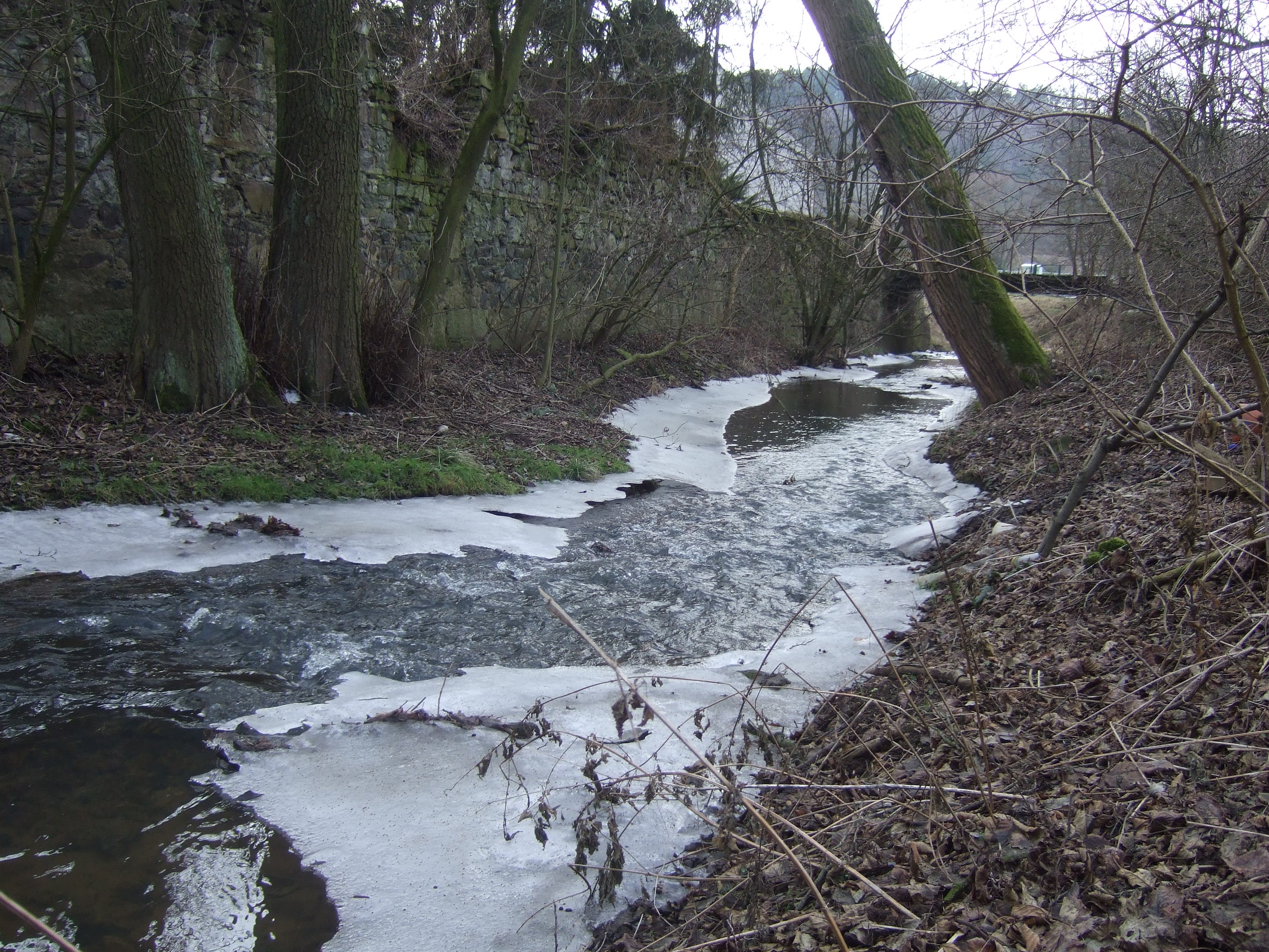 Vyfoceno v únoru 2009